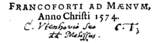 Eigenhändige Widmung von Paul Melissus, Schediasmata poetica, Frankfurt am Main 1574, an Karl von Utenhove